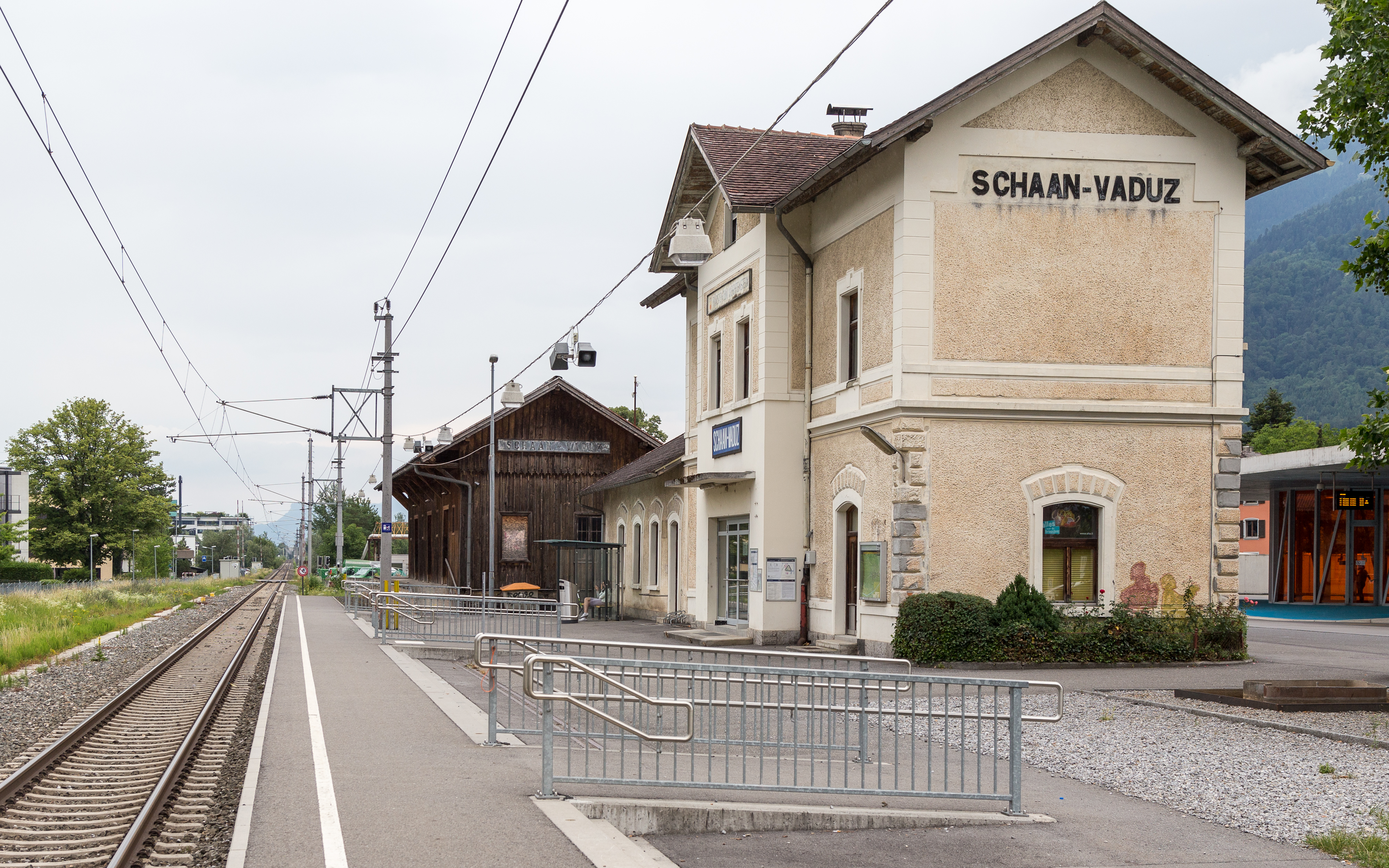 Bahnhof Schaan-Vaduz (FL) an der Bahnlinie Buchs SG (CH) - Feldkirch (A)